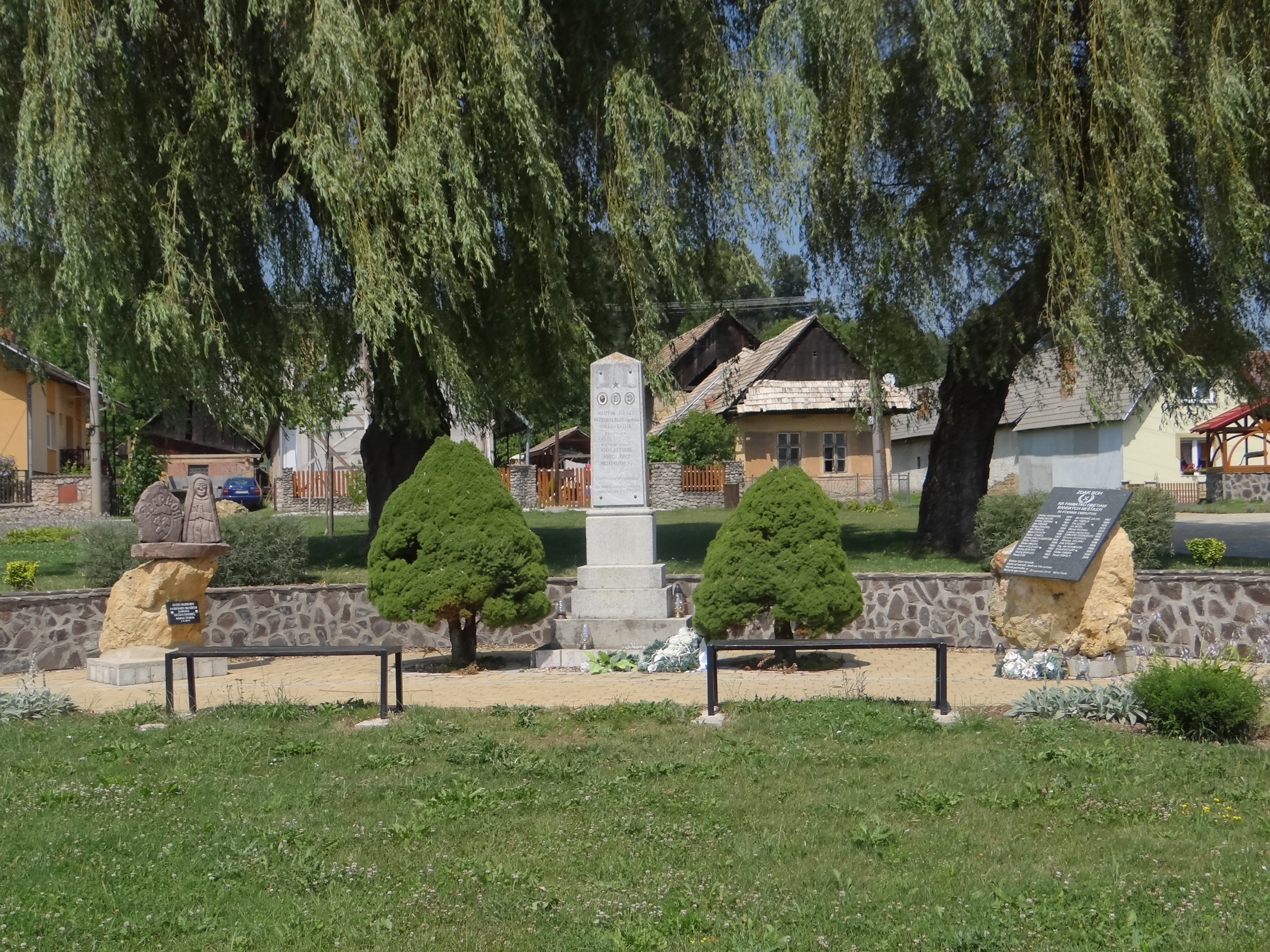 Nižná Slaná